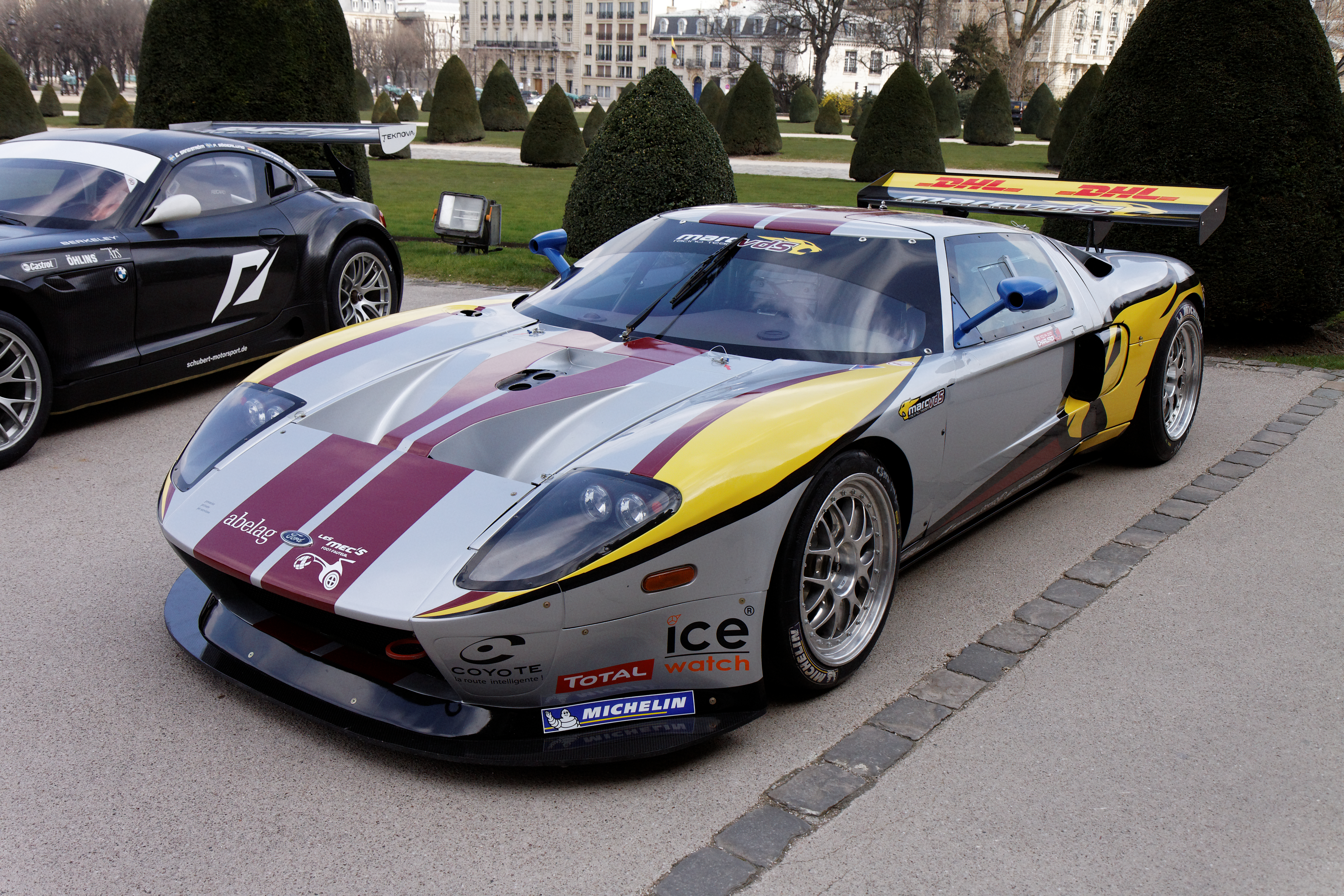 Photographie prise lors de la présentation du Blancpain Endurance series aux Invalides à Paris en mars 2011.